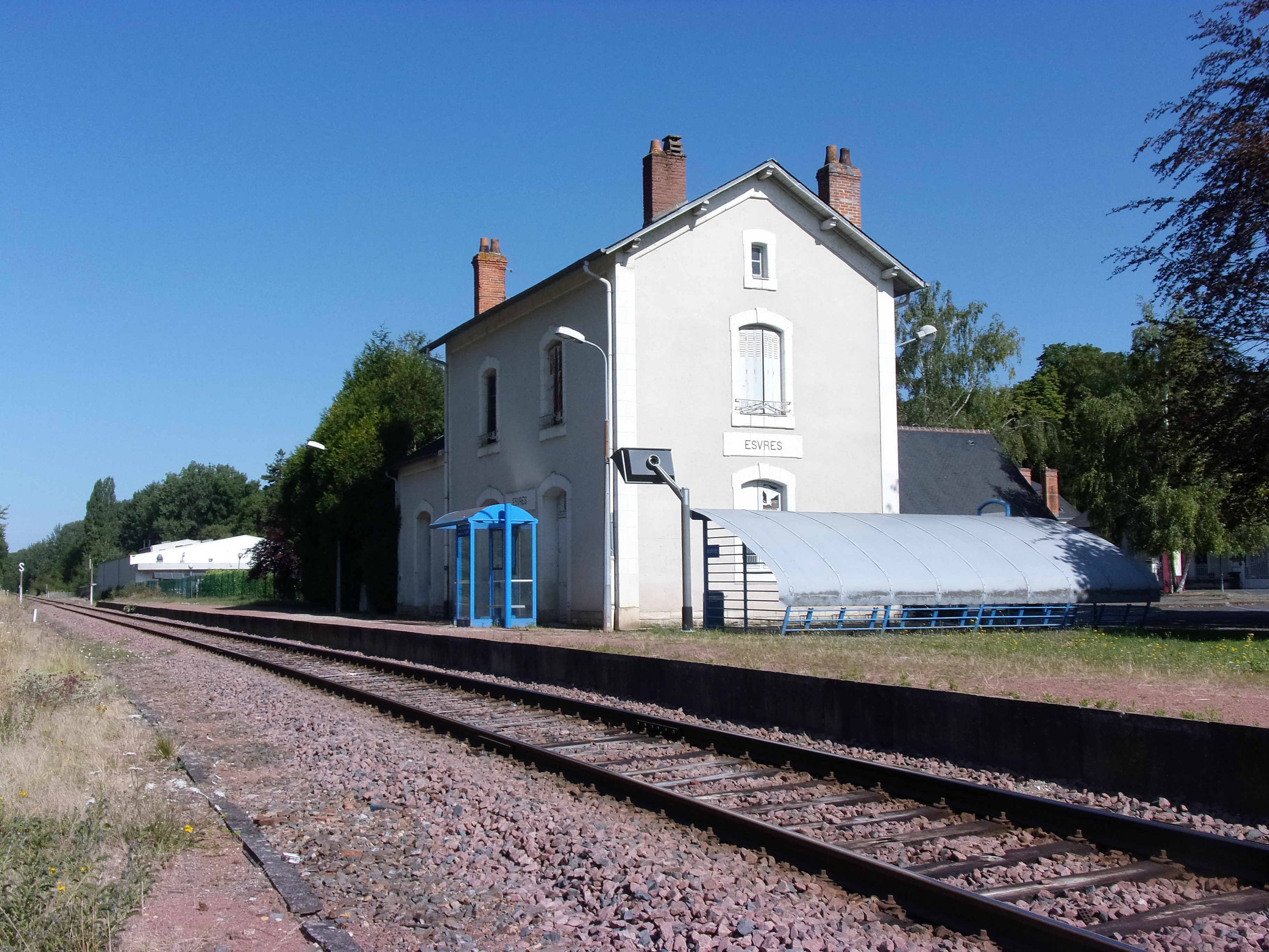 Gres SNCF d'Esvres